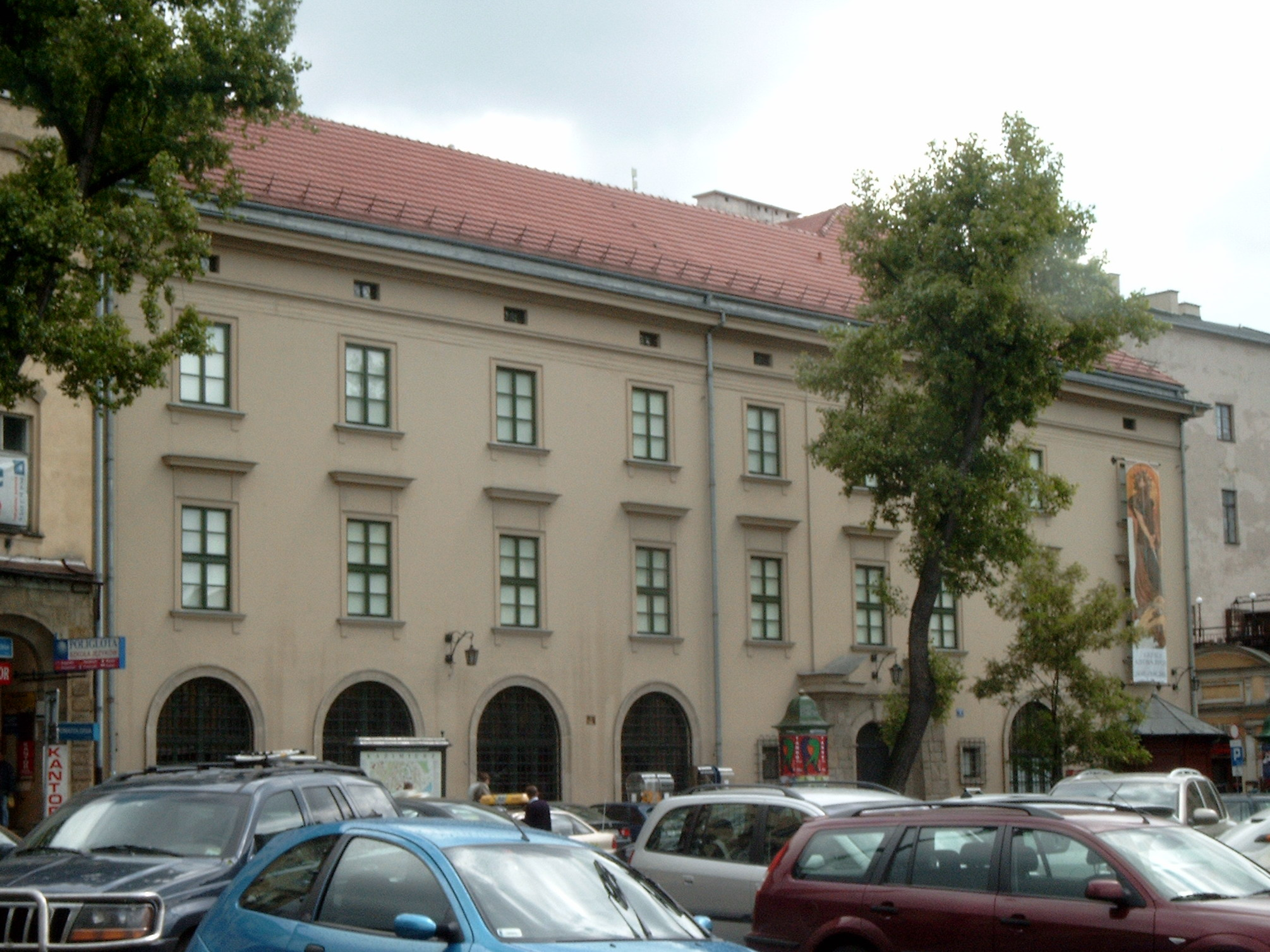 Muzeum Stanisława Wyspianskiego w Krakowie